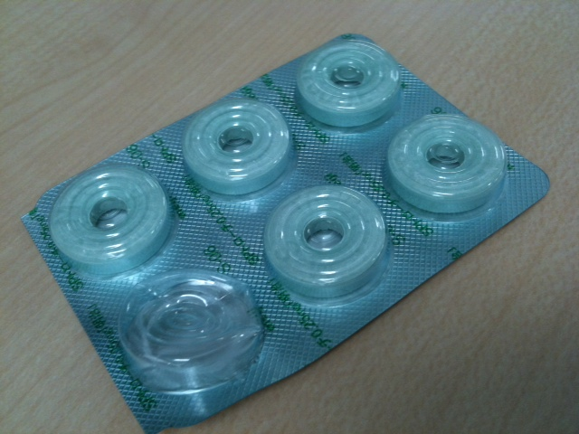 娘のを少しもらった。